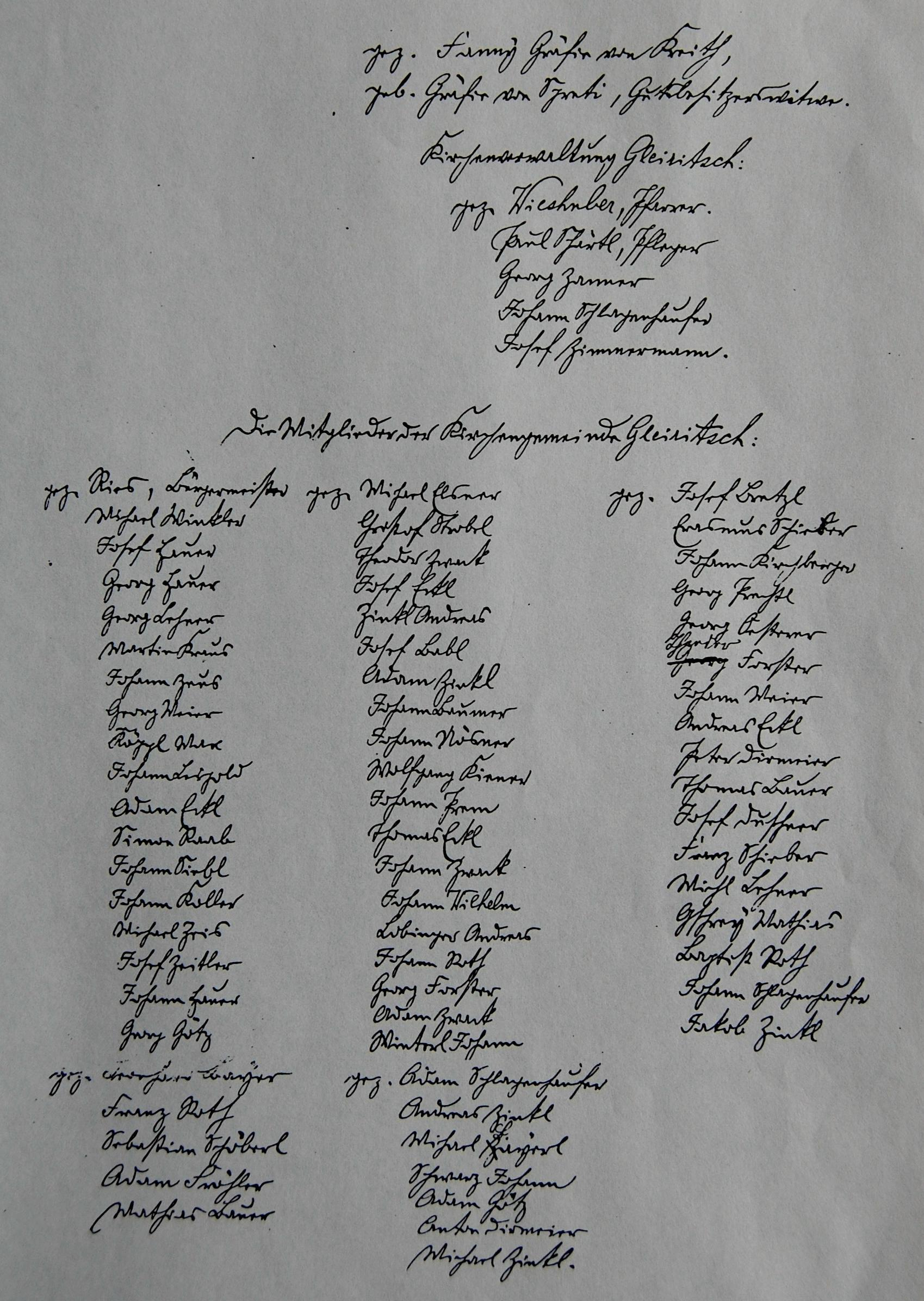 Die Gräflich von Kreithsche Expositurstiftung zu Ehren der Schulterwunde Christ, Expositur Maria Magdalena, Gleiritsch, Abschrift der Unterzeichner des Stiftungsbriefes (1897)